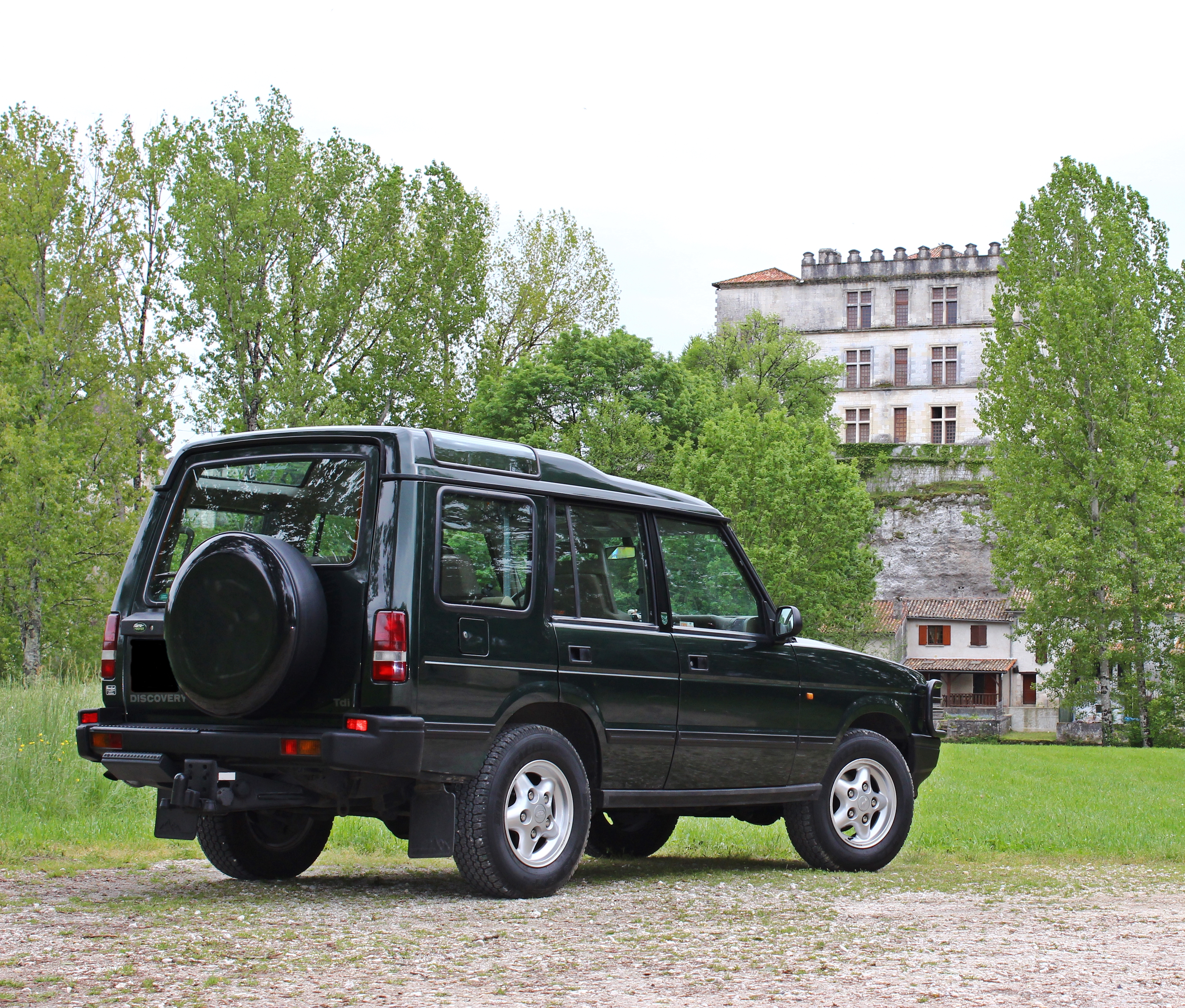 Land Rover Discovery 300 tdi 3/4 arriére